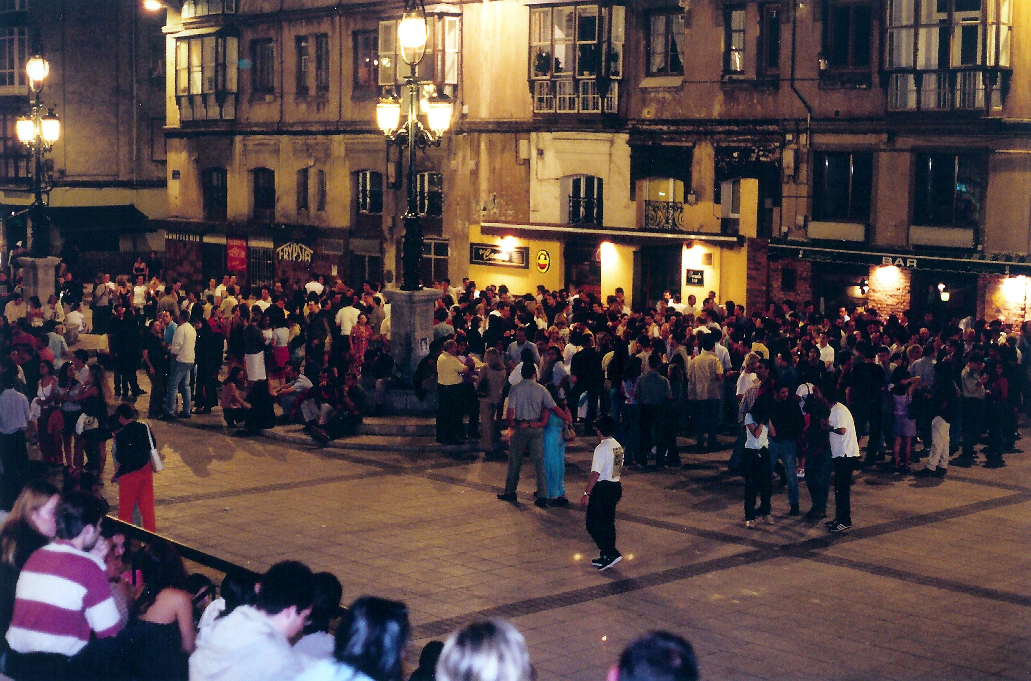 Ambiente nocturno en Santander (Plaza Cañadío). (Cantabria, España).